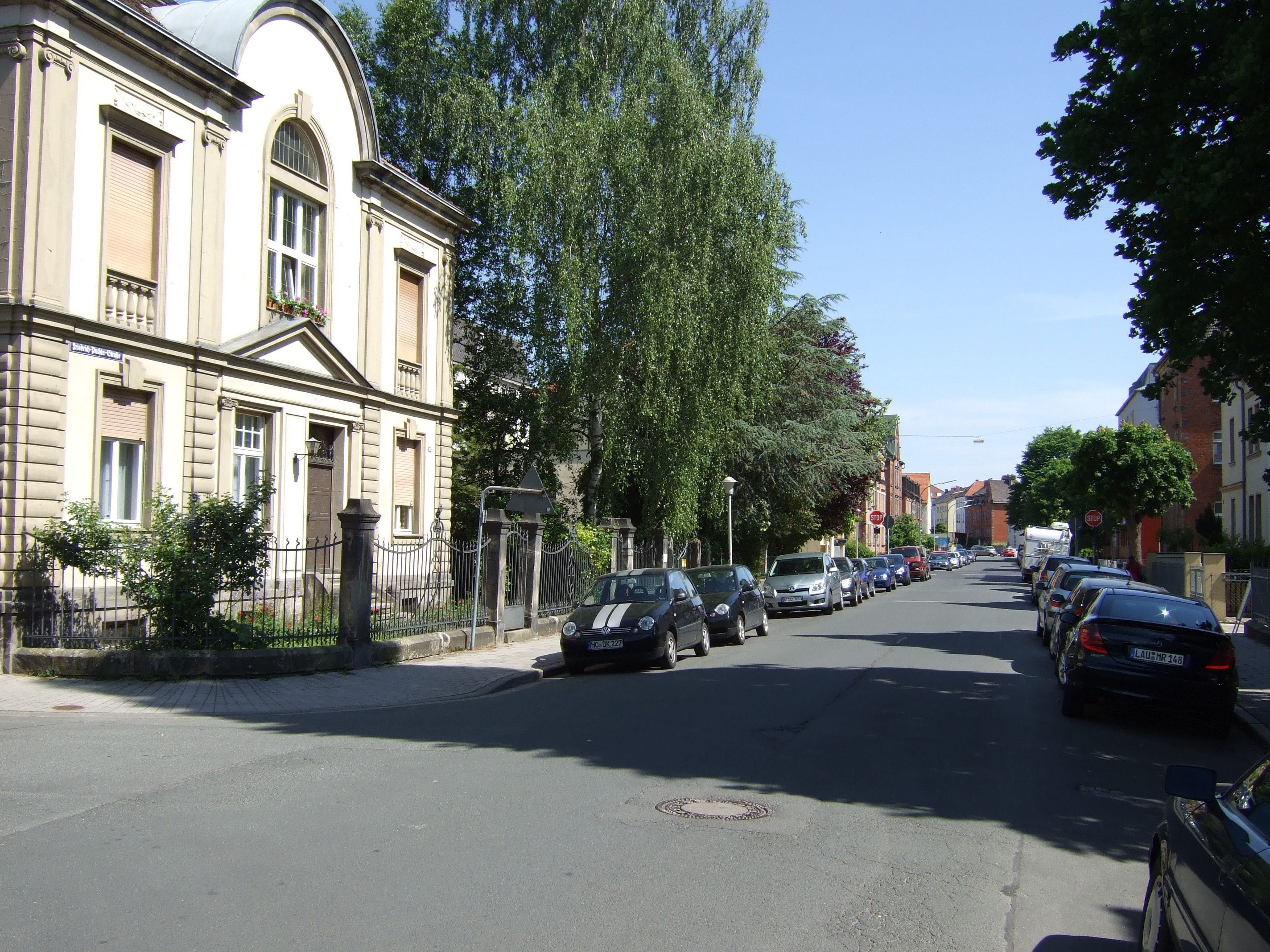 Friedrich-Puchta-Straße Bayreuth